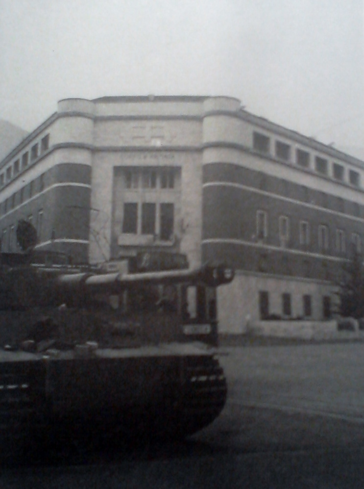 Carro armato Tiger davanti al comando del XXXV Corpo d'Armata (9 settembre 1943)